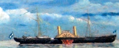 Vapor de transporte armado Pampa (Escuadra Sarmiento, Armada Argentina)